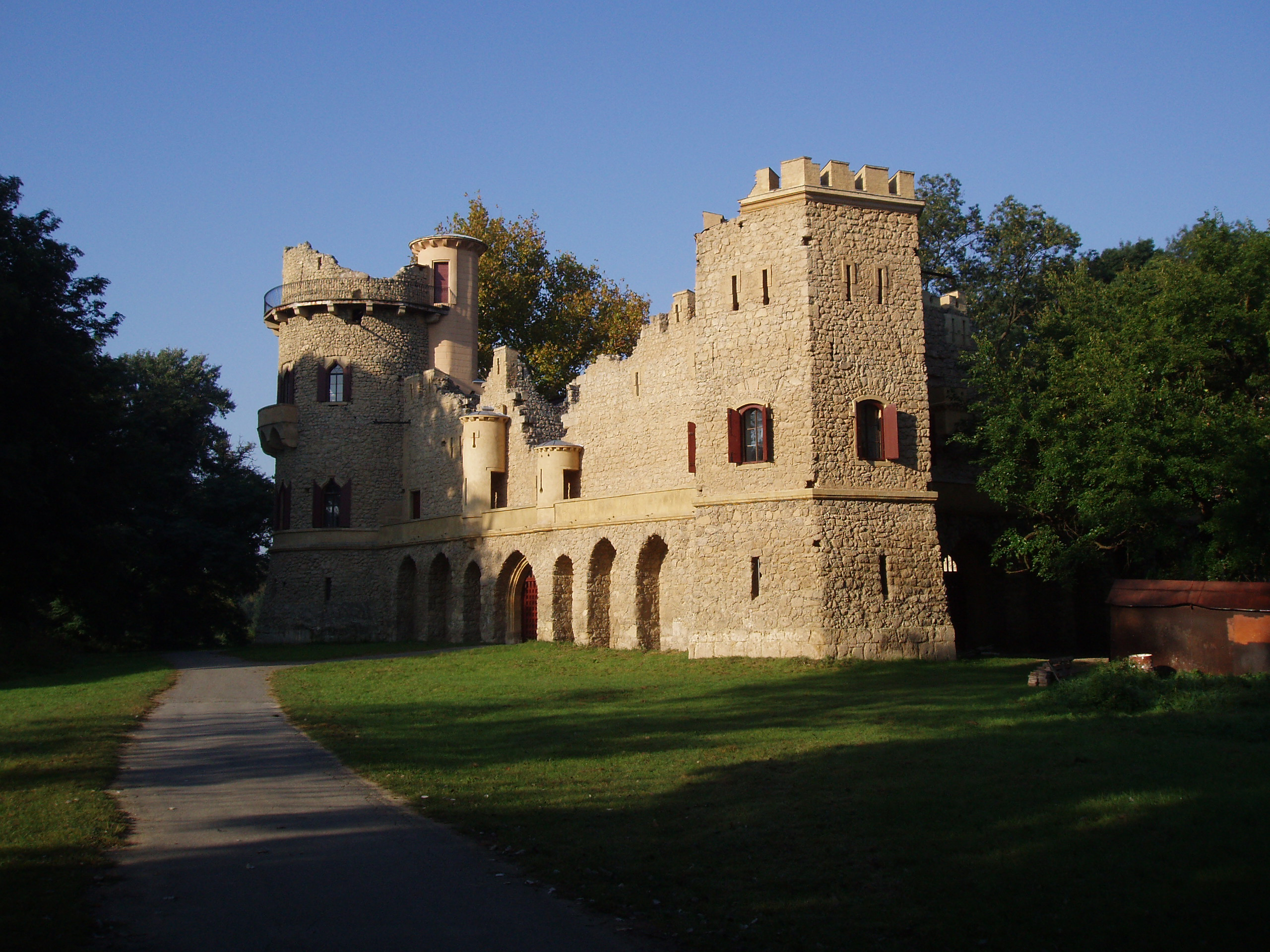 Januv hrad - Lednice, Czech republic